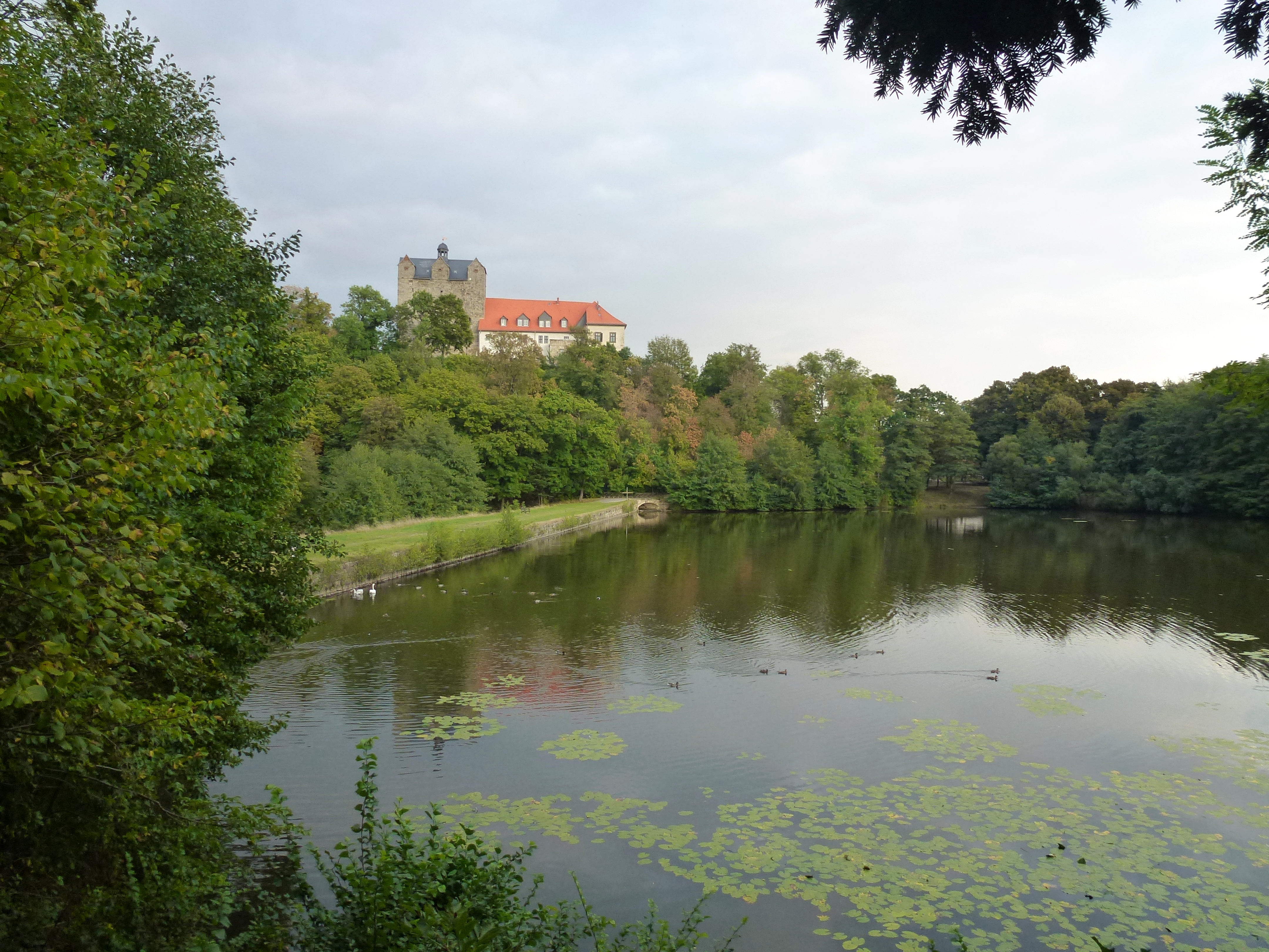 Schloßteich im Schlosspark Ballenstedt